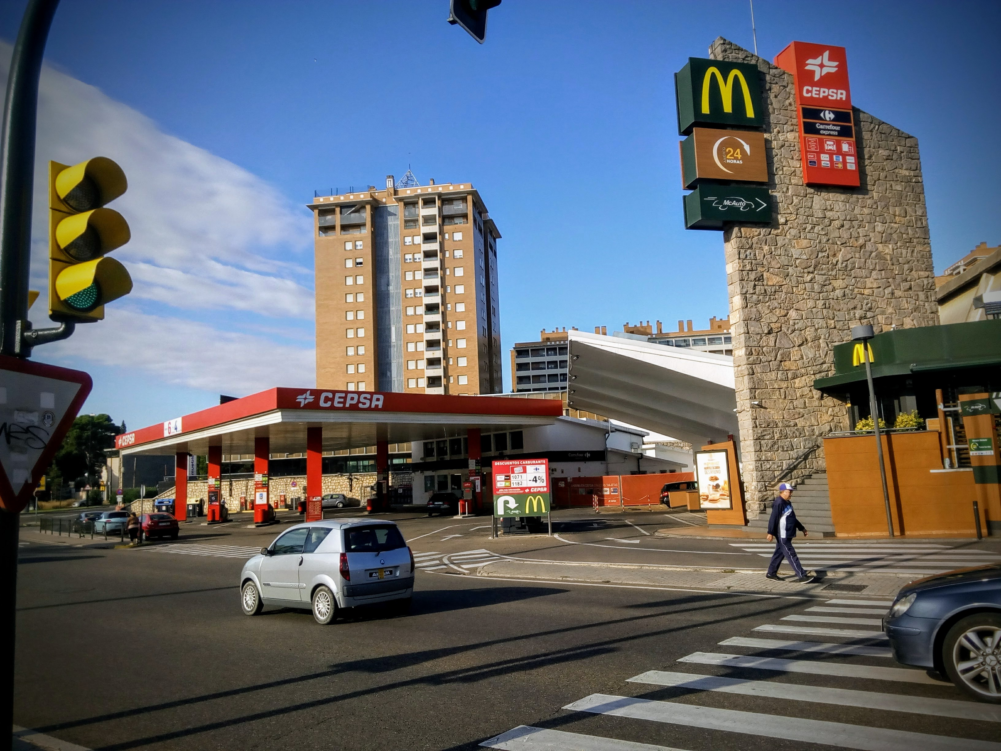 Estación de servicio Los Enlaces